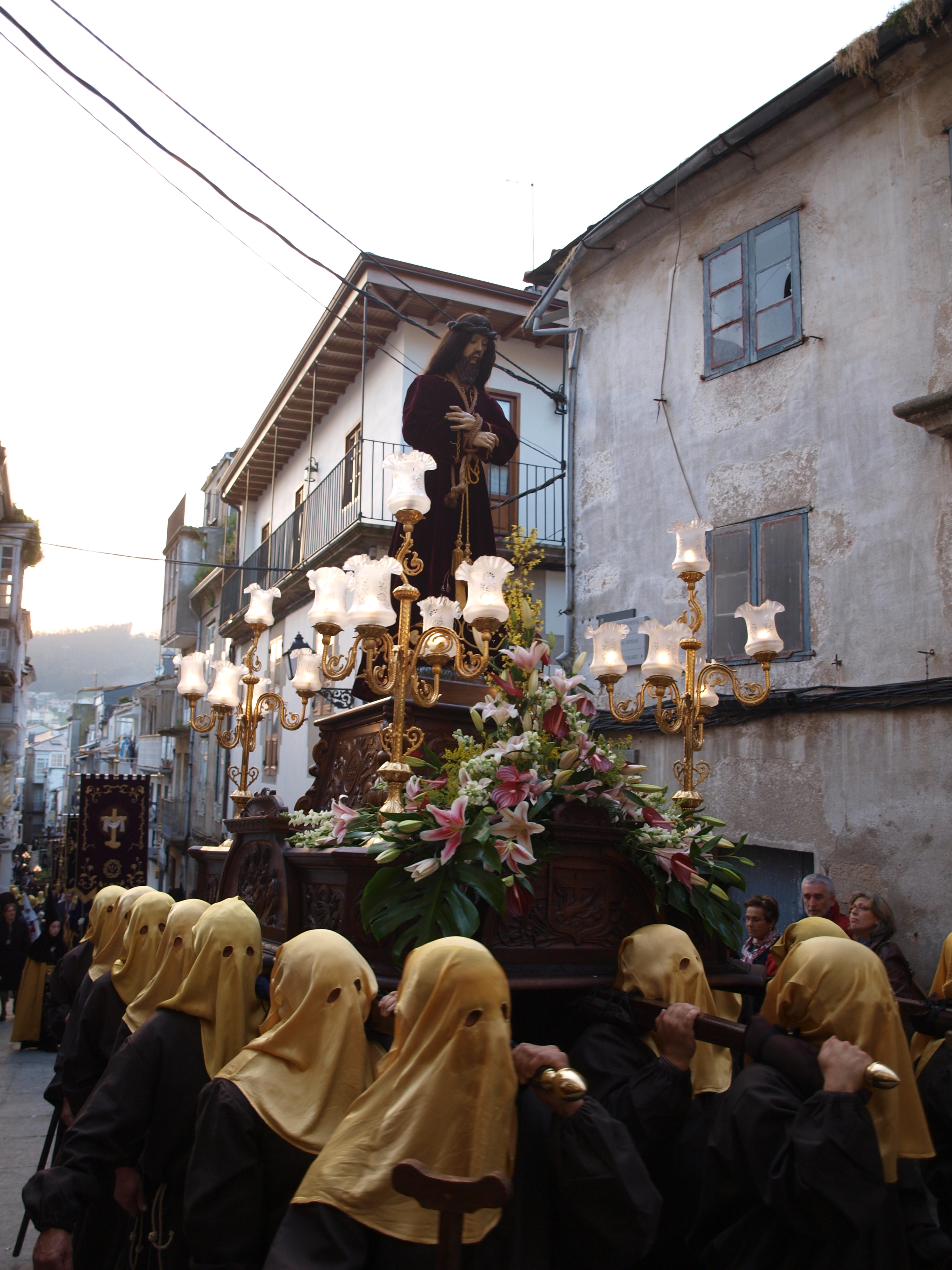 Ecce Homo dos Franceses ó seu paso pola Avenida de Lourdes - Semana Santa de Viveiro 2011